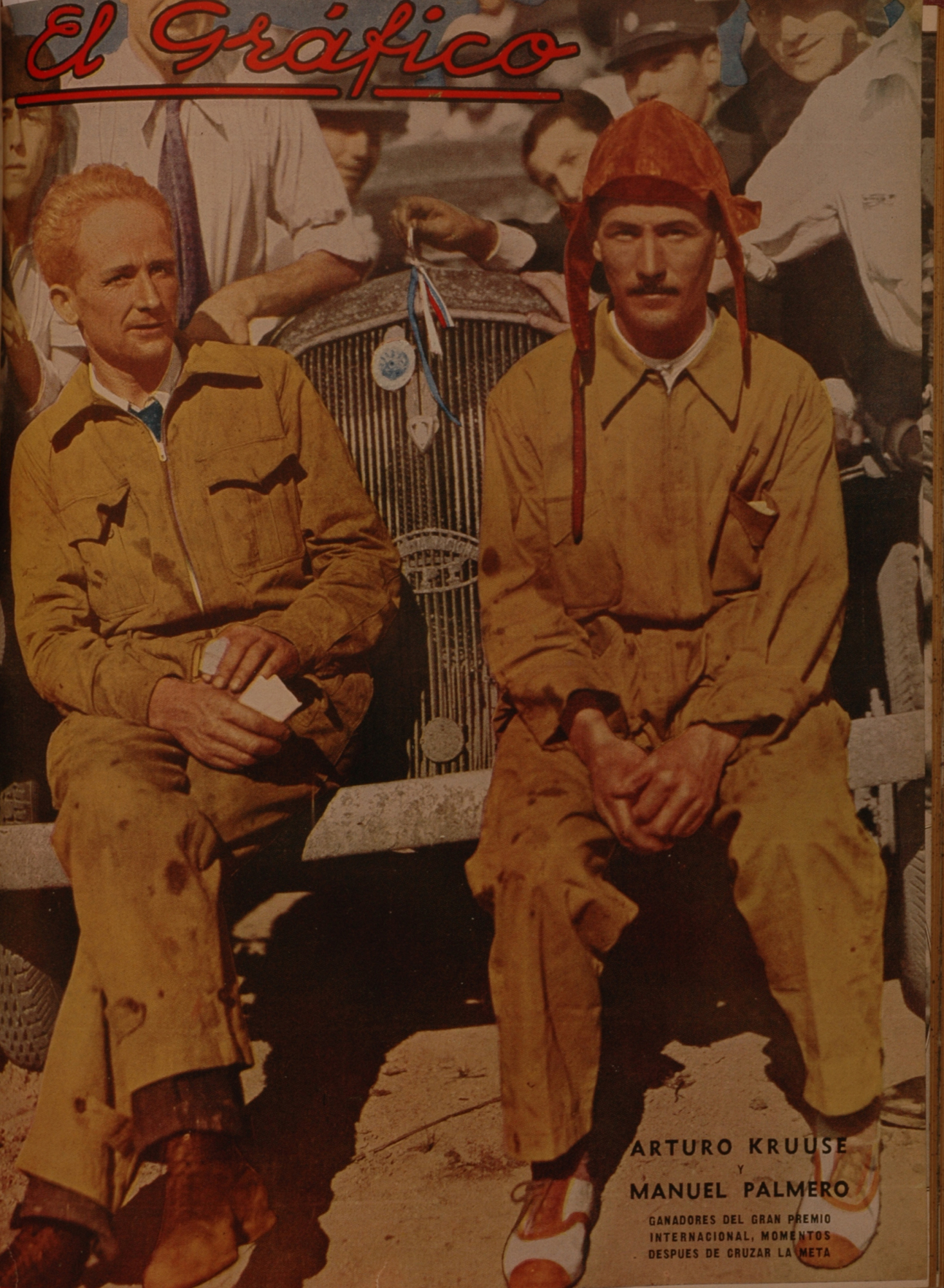 El Grafico del 06 de Abril de 1935. Edicion 821